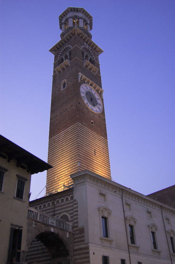 Torre dei Lamberti as seen from Piazza delle Erbe, in Verona